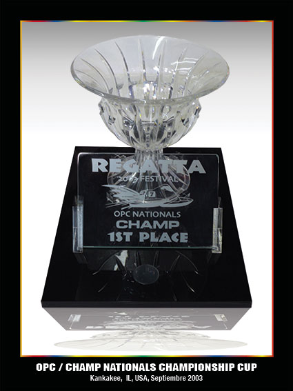 Trofeo OPC Nationals, 1er. Lugar Campeón Americano 2003